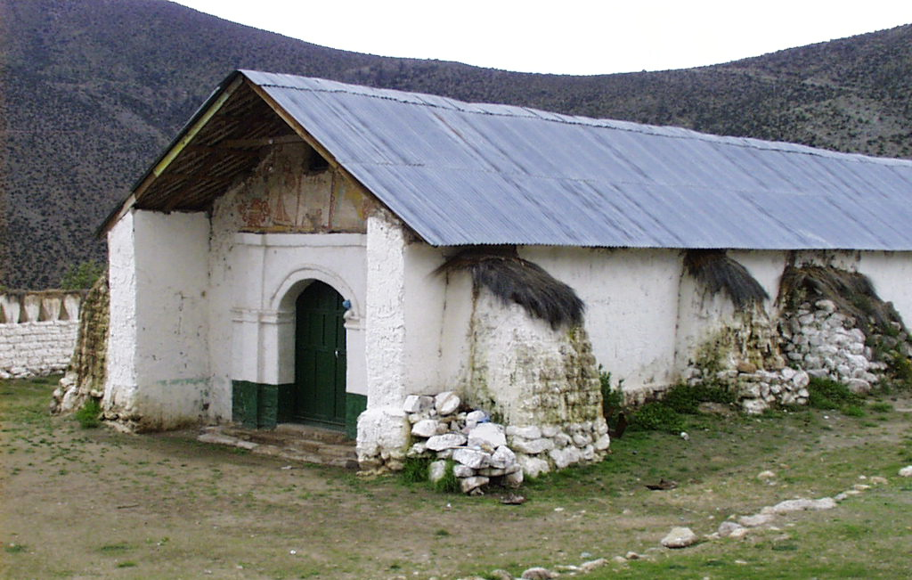 Iglesia de San Andrés Apóstol de Pachama This is a photo of a national monument in Chile: 2227